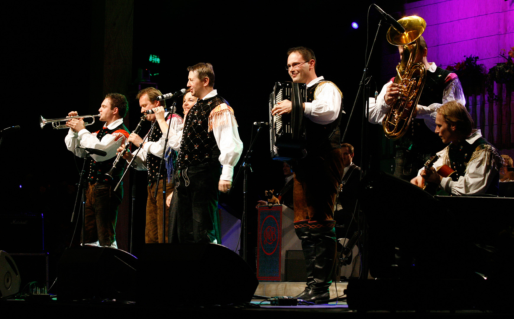 Die jungen Original Oberkrainer mit der Musikantenstadl-Tournee in der Wiener Stadthalle.